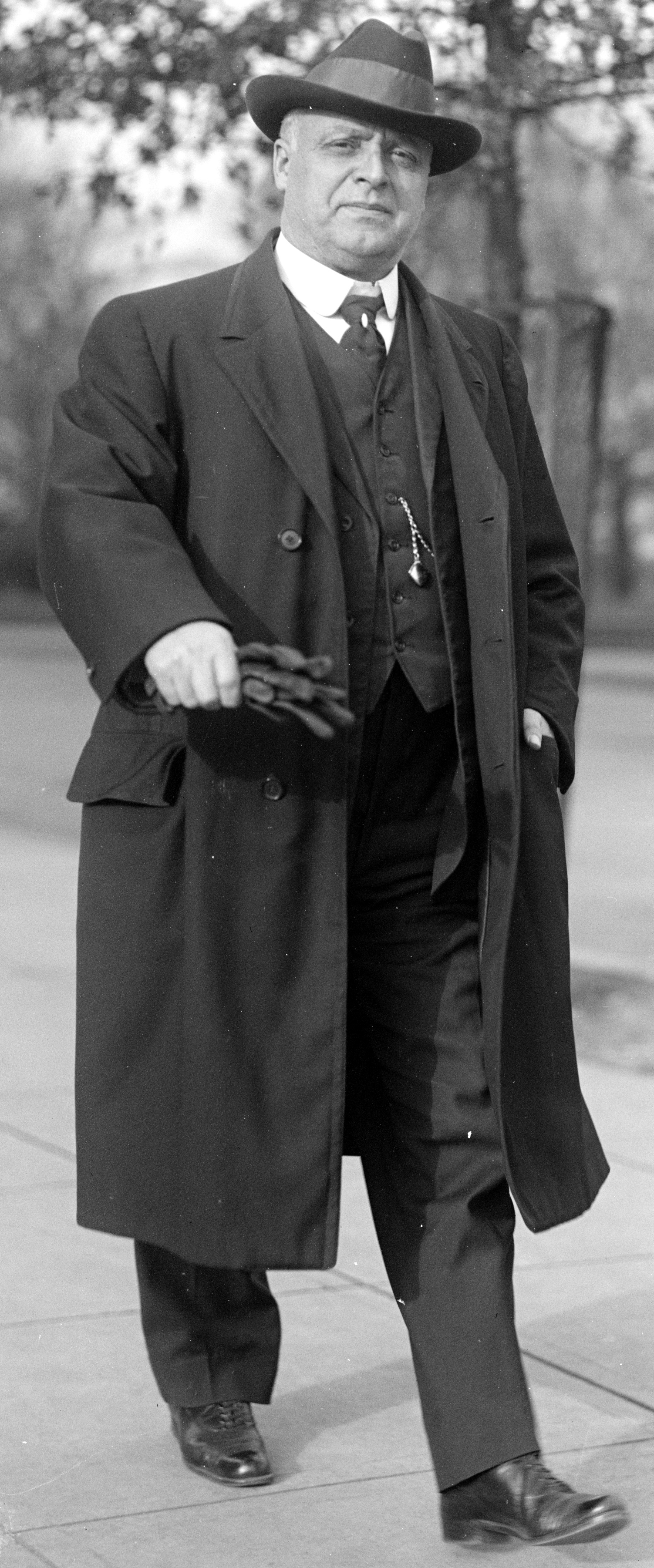 ESCH, JOHN JACOB. REP. FROM WISCONSIN, 1899-1921